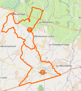 Carte de la commune nouvelle et de ses communes déléguées